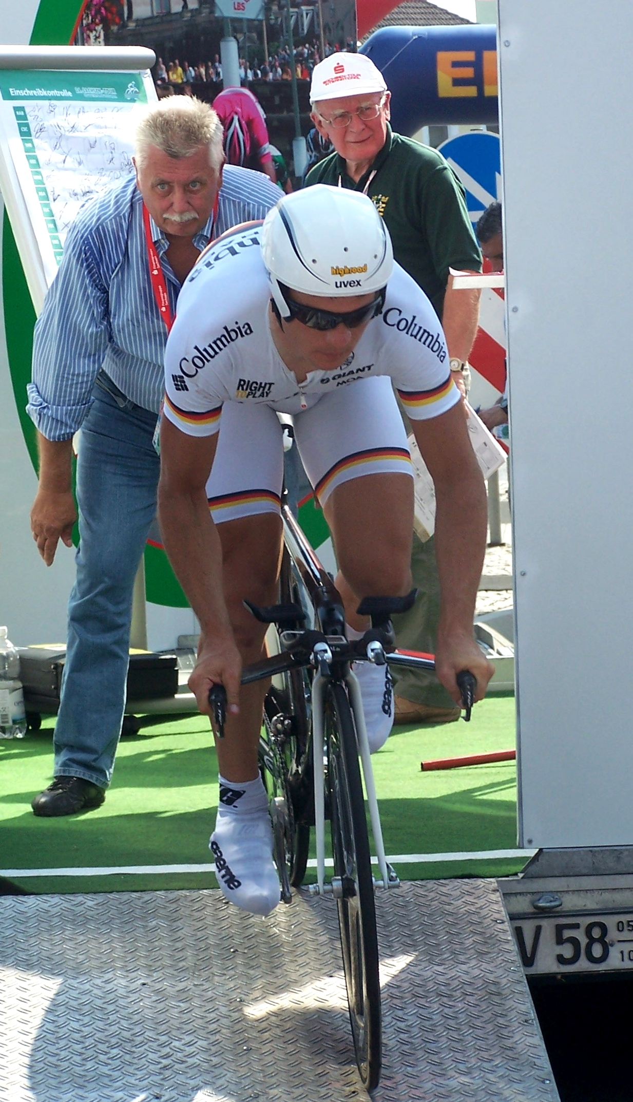 Die Aufnahme entstand beim Einzelzeitfahren der Sachsen-Tour 2008 in Großenhain